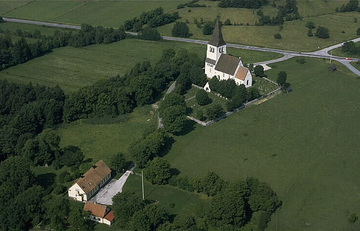 Motiv: Rute kyrka Nyckelord: Flygbilder, Riksintressen Kategori: Kyrkomiljö Rute kyrka. Länsväg 148 går förbi norr om kyrkan.